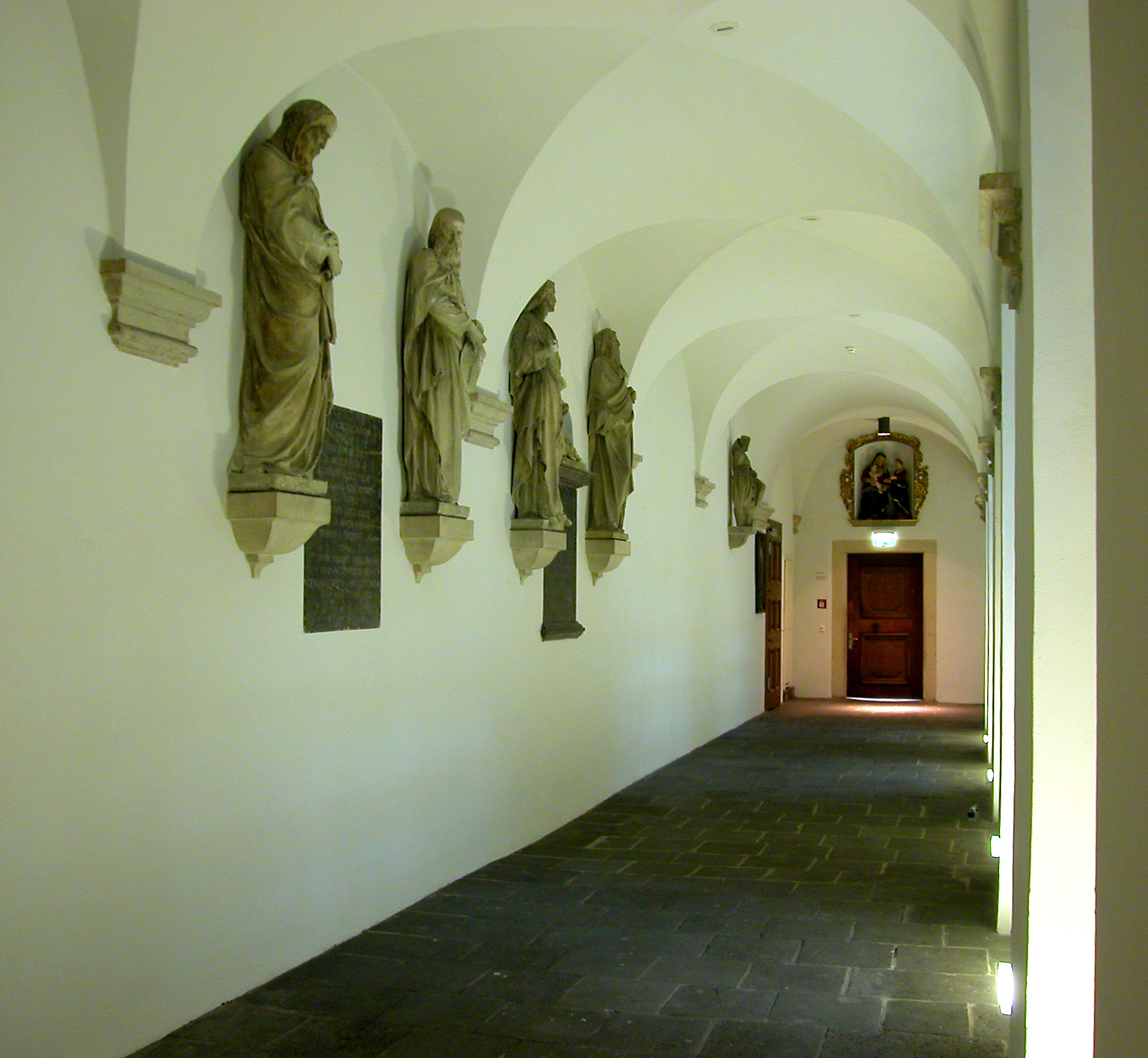 St. Maximilian in Düsseldorf, Deutschland